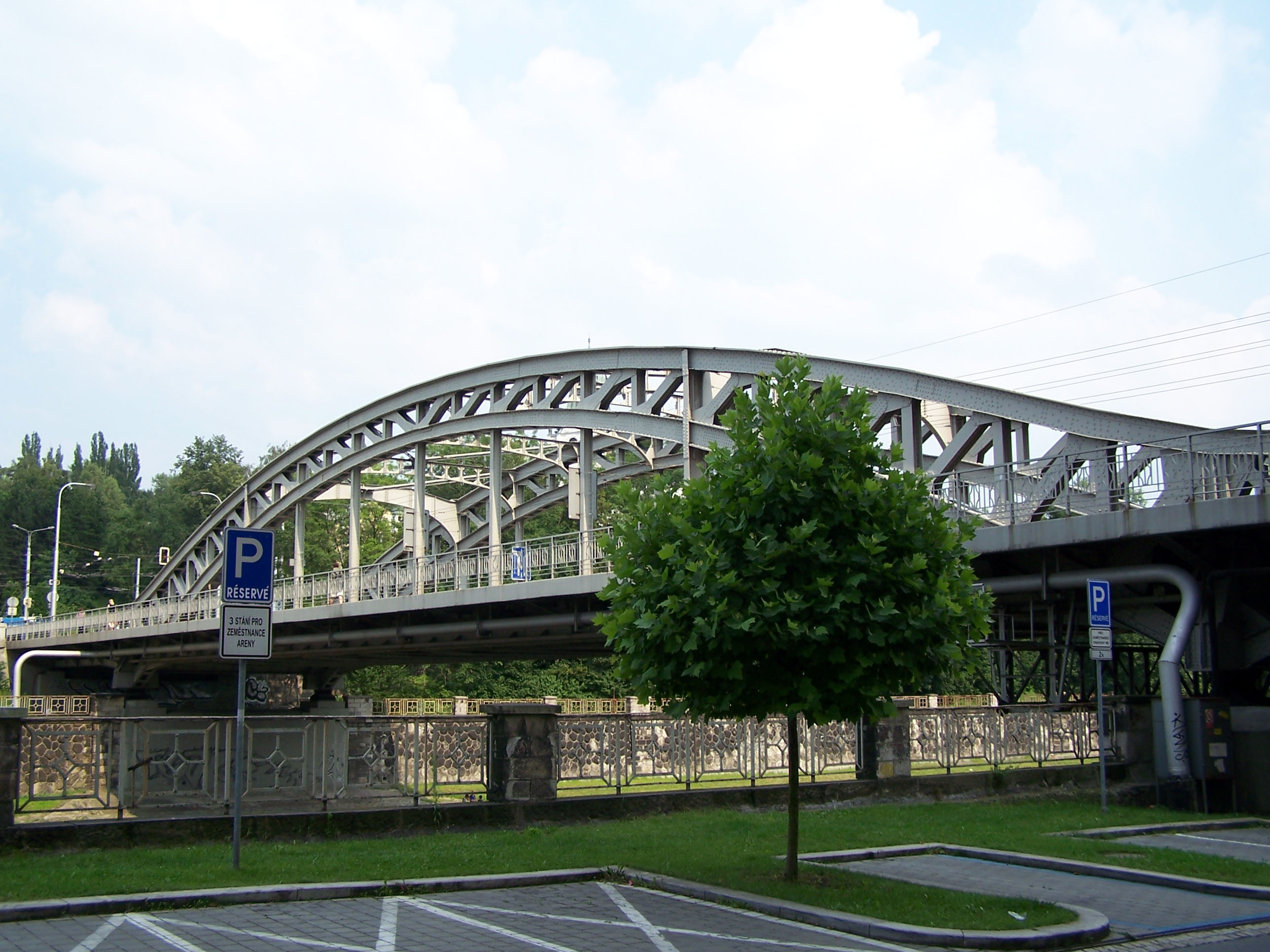 Sýkora Bridge in Ostrava, Czech Republic